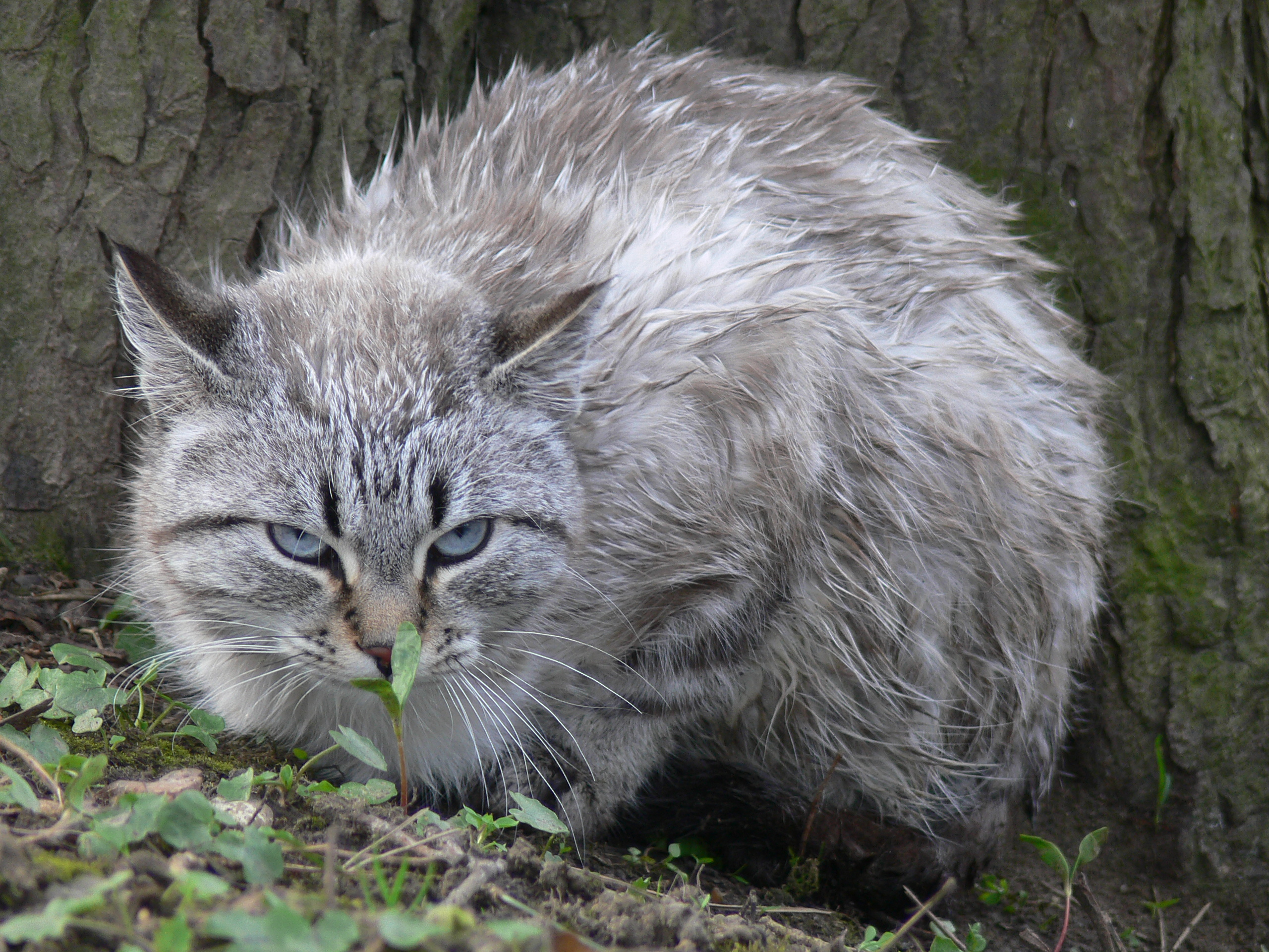 chat malade et mouillé au pied d'un arbre.